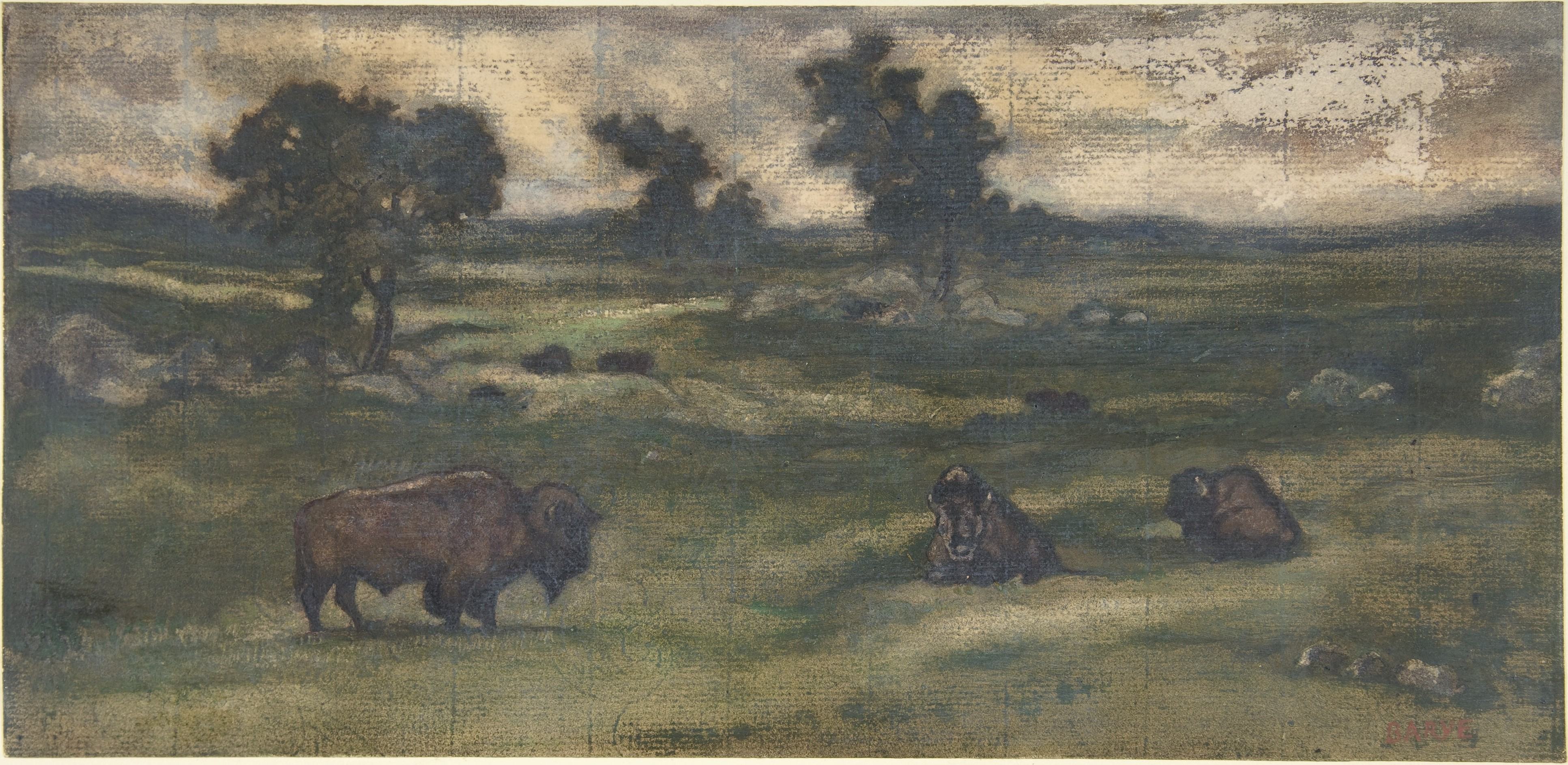 Drawing; Drawings